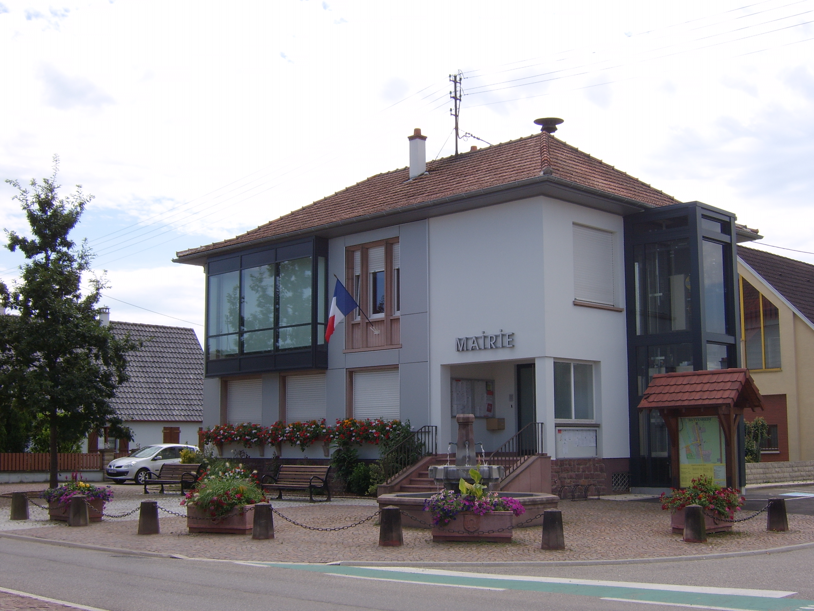 Mairie de Battenheim (Alsace, France)